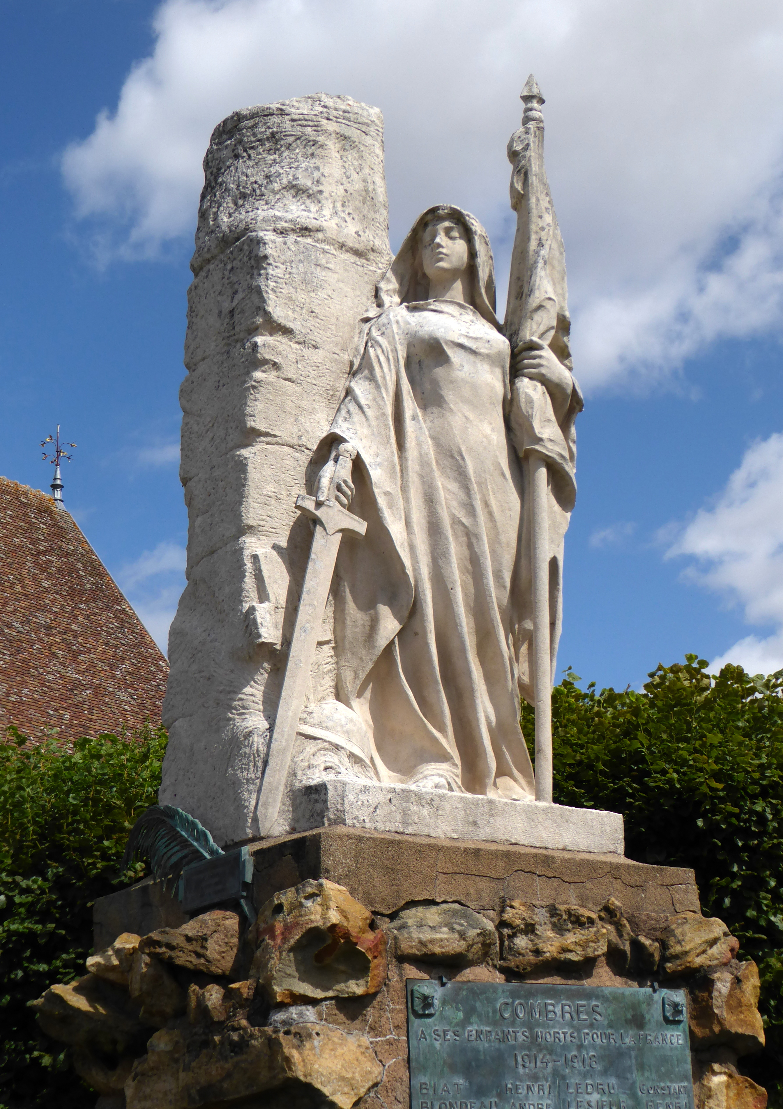 Monument aux morts de Félix Charpentier, Combres, Eure-et-Loir (France).